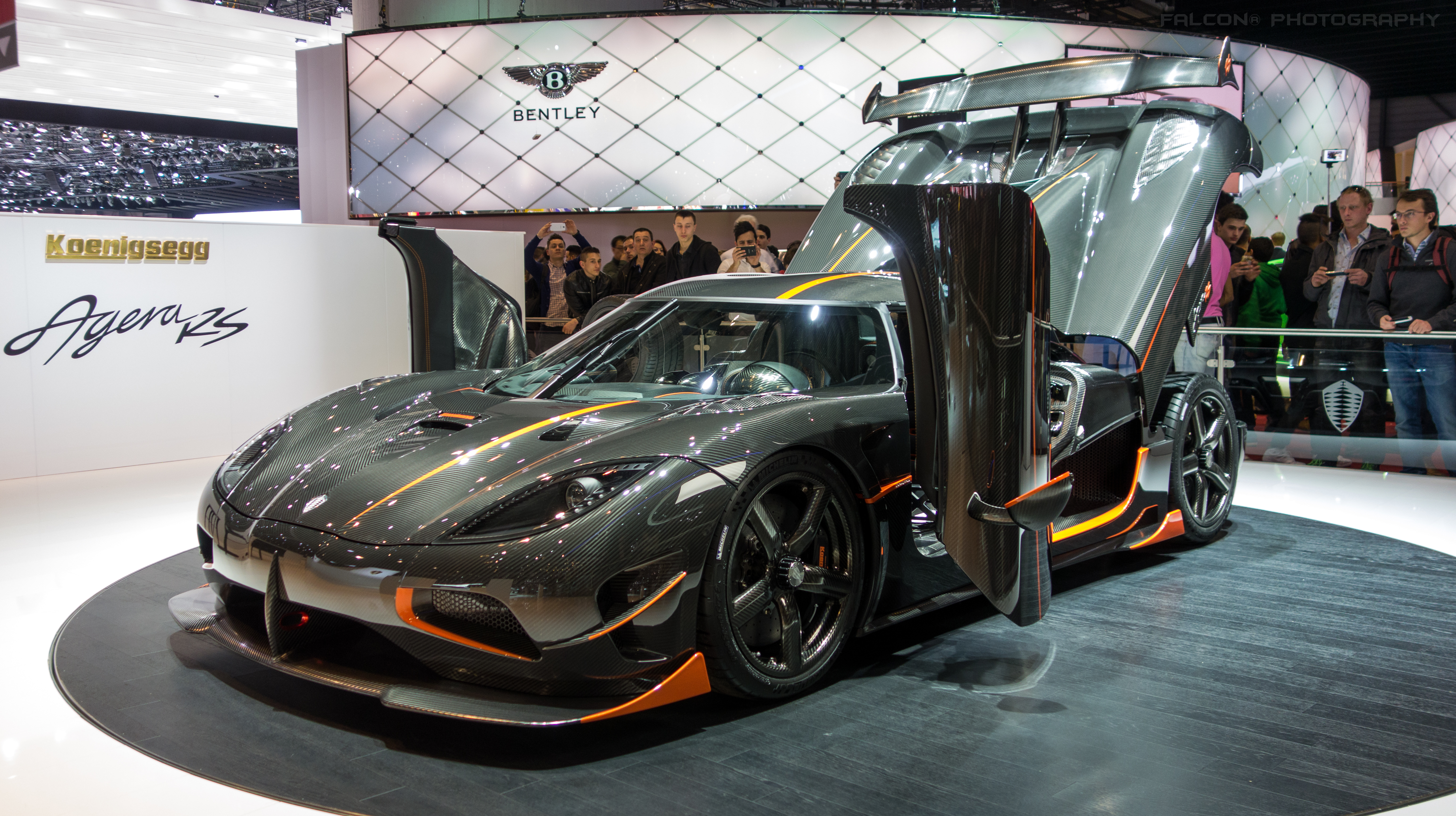 25 exemplaires 2015 V8 Koenigsegg 5.0 bi-turbo 1160cv 1200N.m 1295kg à sec 442km/h 0-100 en 2,8sec Boite séquentiel 7 rapports. 1 650 000$ en 2015